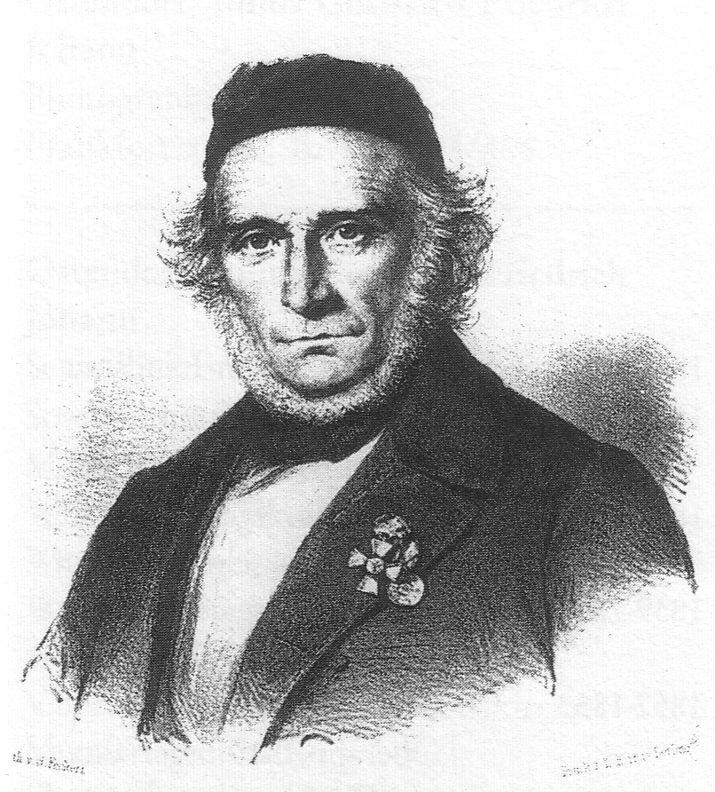 Johann Ernst Nizze (1788-1872), Abgeordneter der Paulskirche